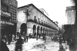 Fotografia tomada despues de la toma de zacatecas, en la que muestra los daños causados a parte de la ciudad.